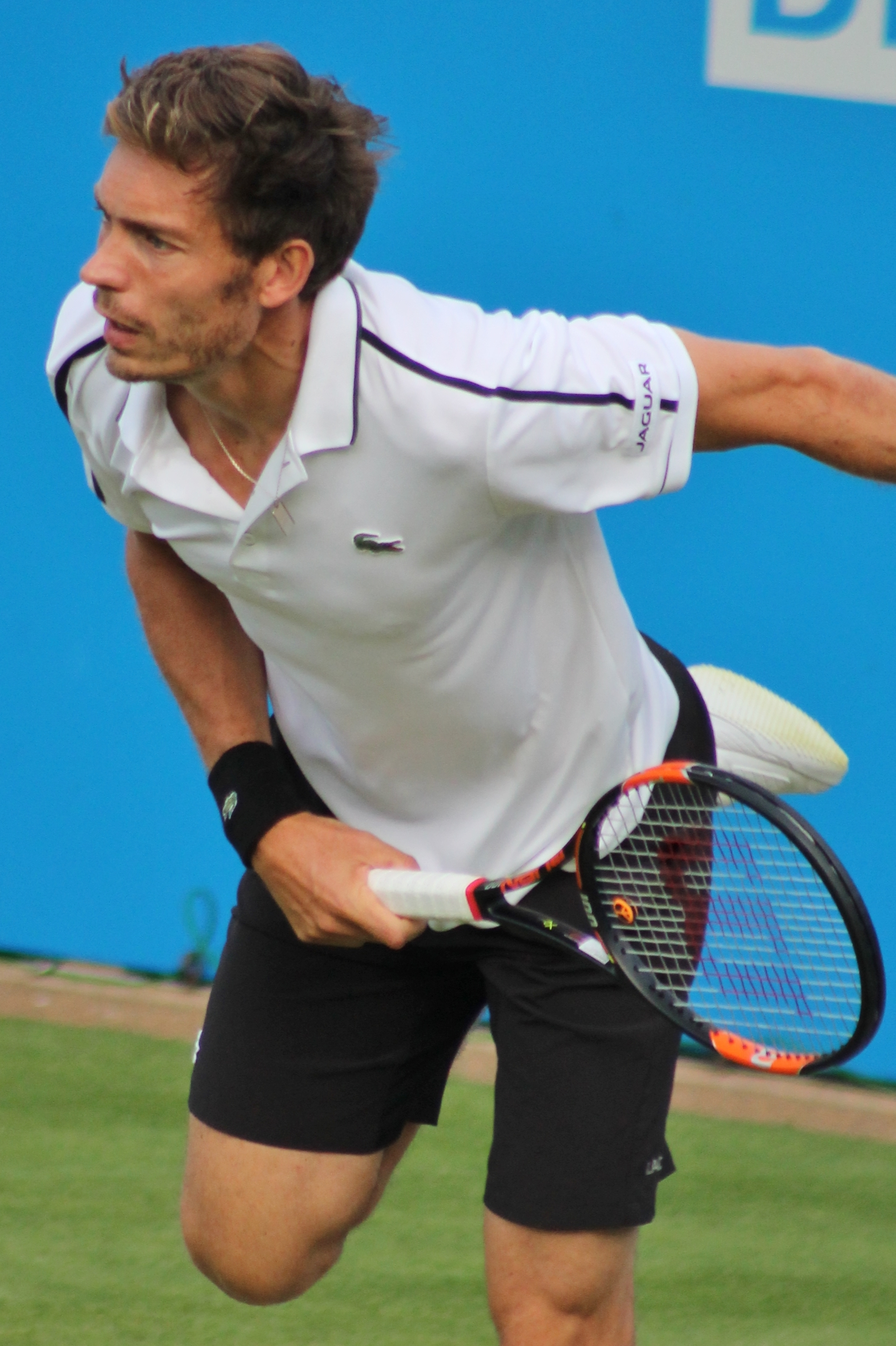 Mahut QC15 (6)